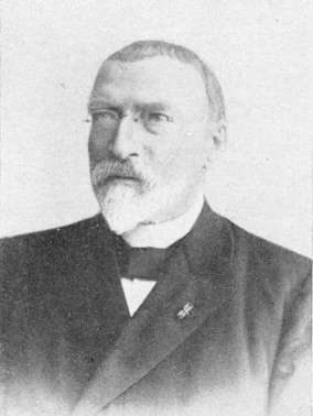 Georg August Thilesen (1837-1917)